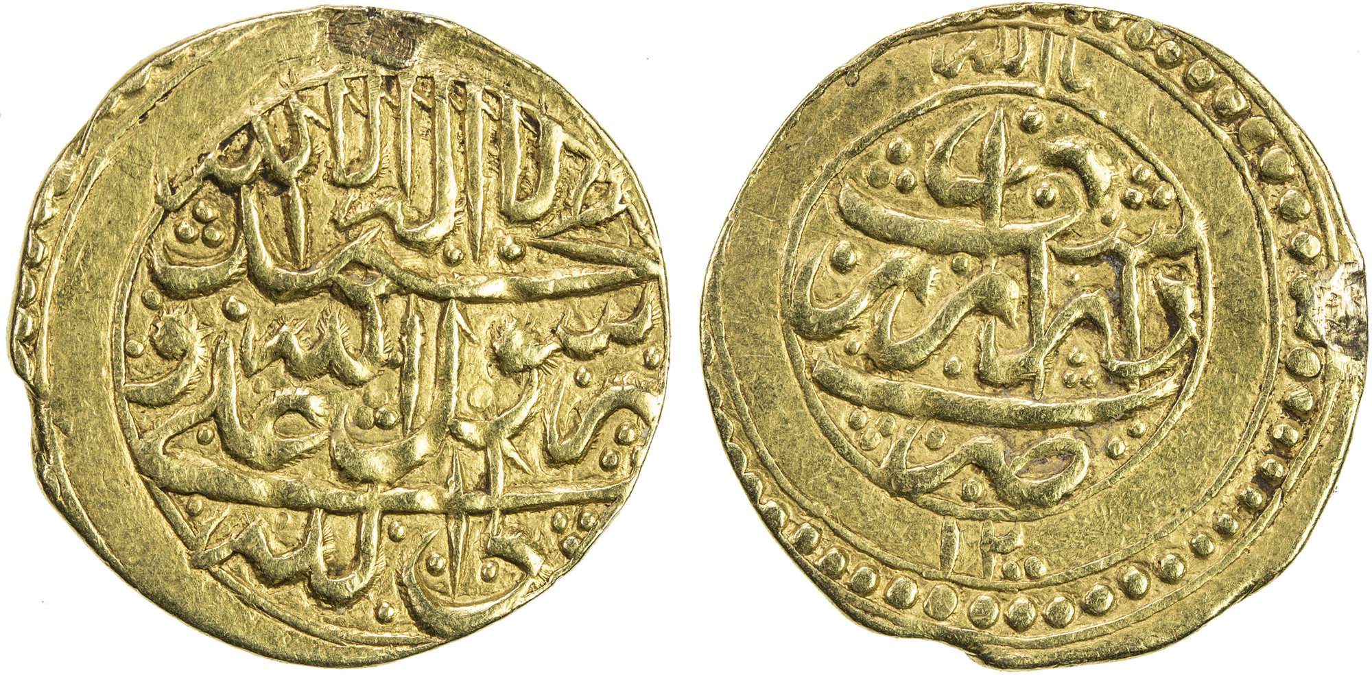 سکه یک چهارم اشرفی هدایت الله خان